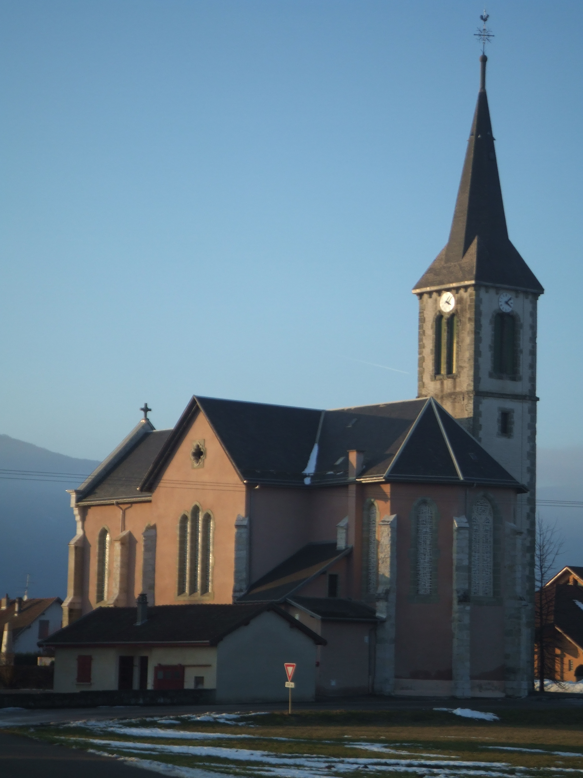 église de Vallières, en Haute-Savoie